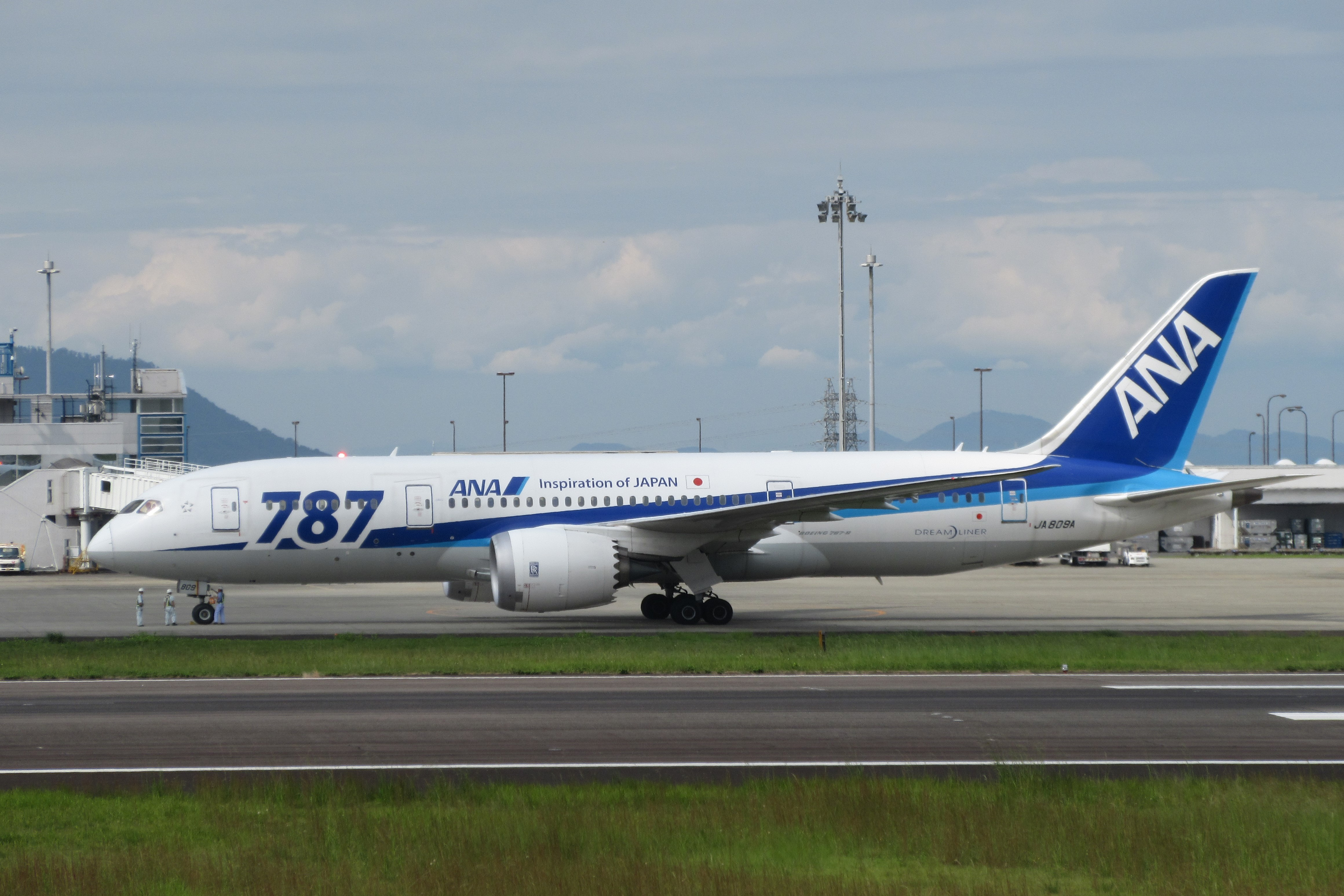 ANA JA809A (高松空港にて)